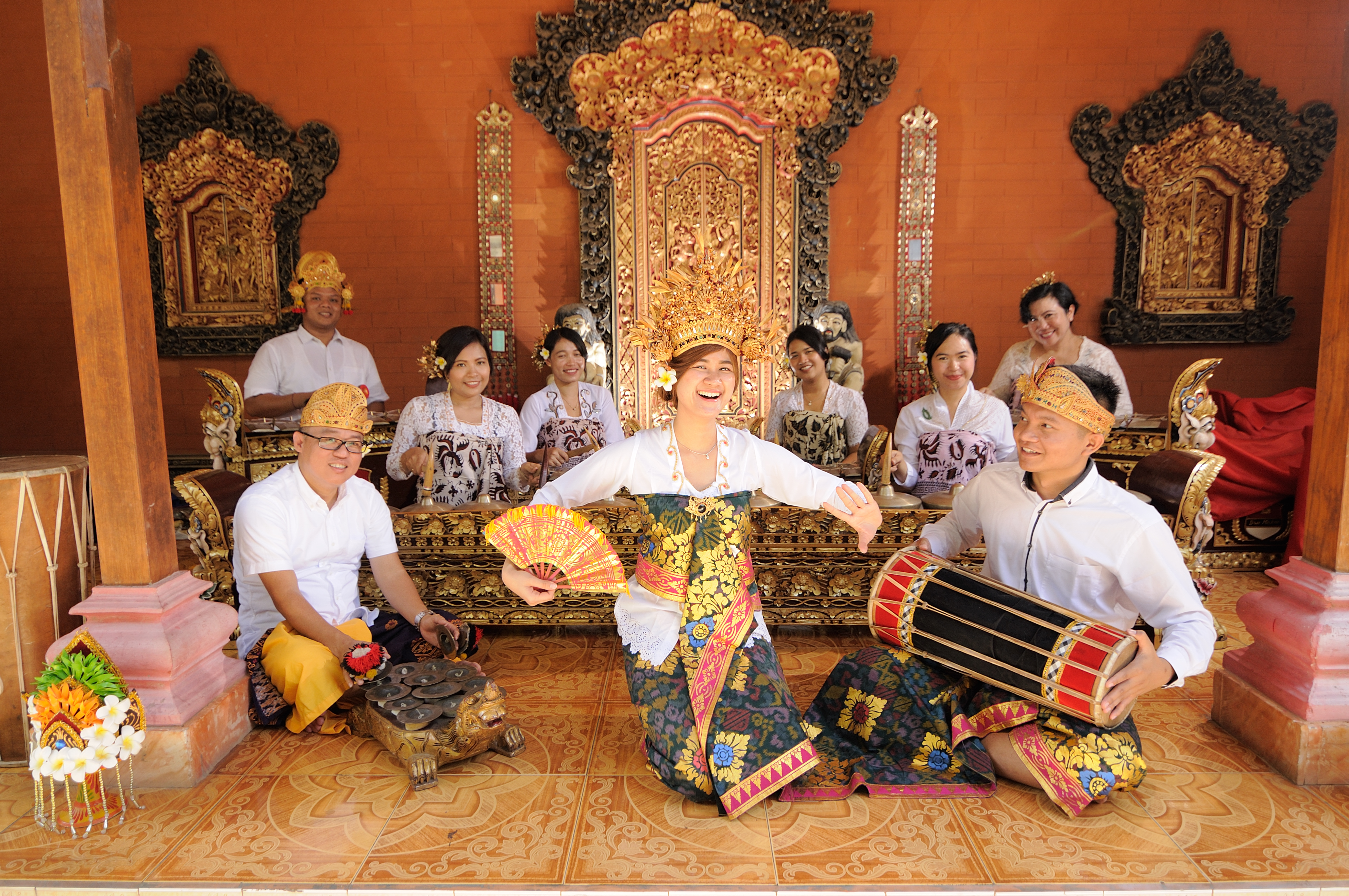 Kelompok ini terdiri atas para pemain gamelan bali dan satu penari wanita di tengah panggung. Gamelan Bali adalah salah satu jenis Gamelan yang ada di Indonésia. Orang-orang Bali lebih menyebutnya sebagai "Gambelan". Gamelan ini memiliki perbedaan dengan gamelan jawa yaitu bentuk wilah (bilah pada saron) lebih tebal, bentuk pencon (bentuk gamelan seperti bonang) lebih banyak daripada wilah, ritme lebih cepat. Gamelan Bali sangat khas terutama melalui bunyinya yang meledak-ledak, berkecepatan tinggi, serta bagian gending yang lebih dinamis. Ritme musik yang cepat terutama disebabkan oleh perangkat berbentuk seperti simbal berukuran kecil yang biasa disebut Ceng-Ceng.